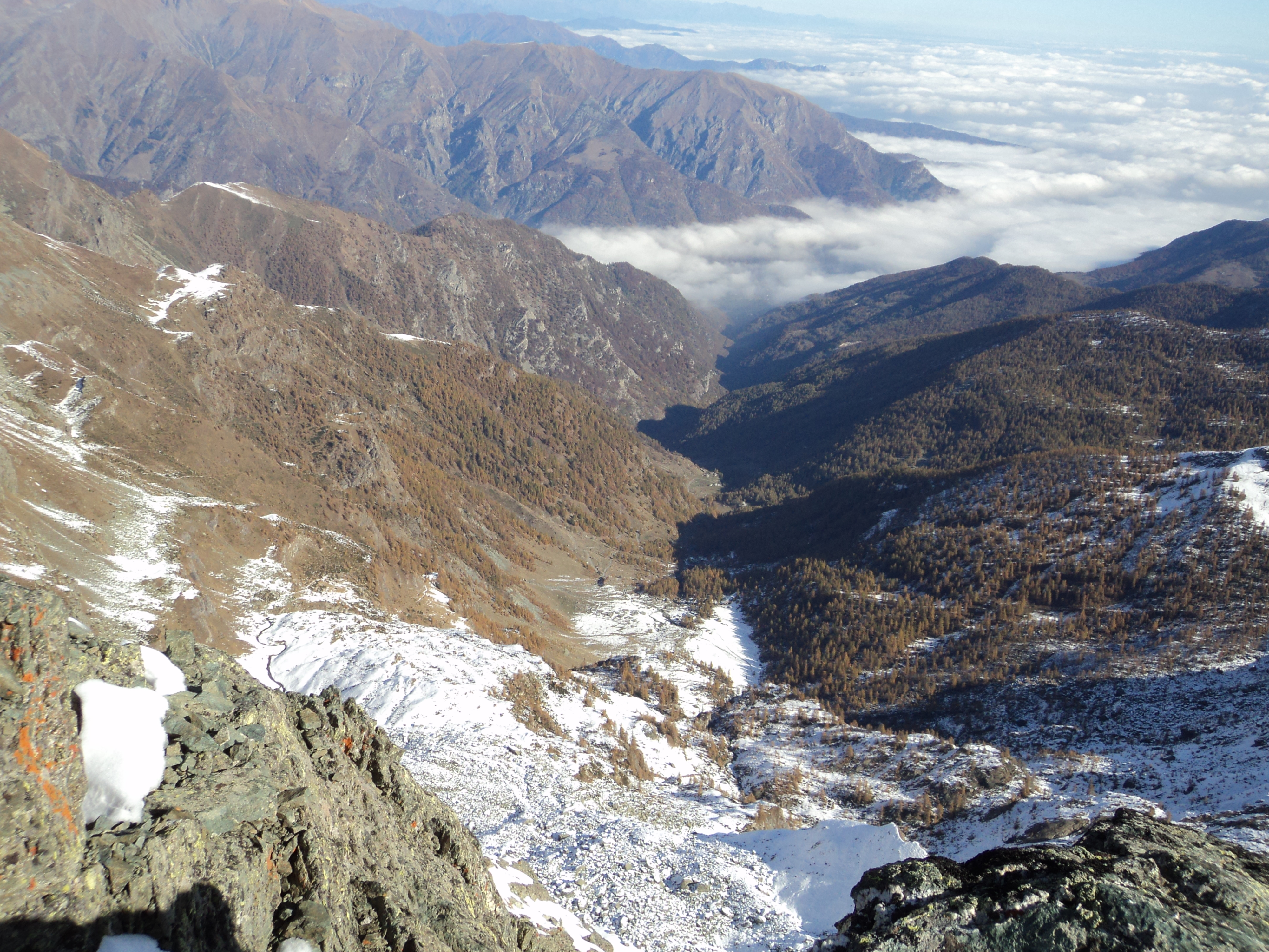 La Comba dei Carboneri e la Val Pellice vista dalla vetta del monte Manzol - Provincia di Torino